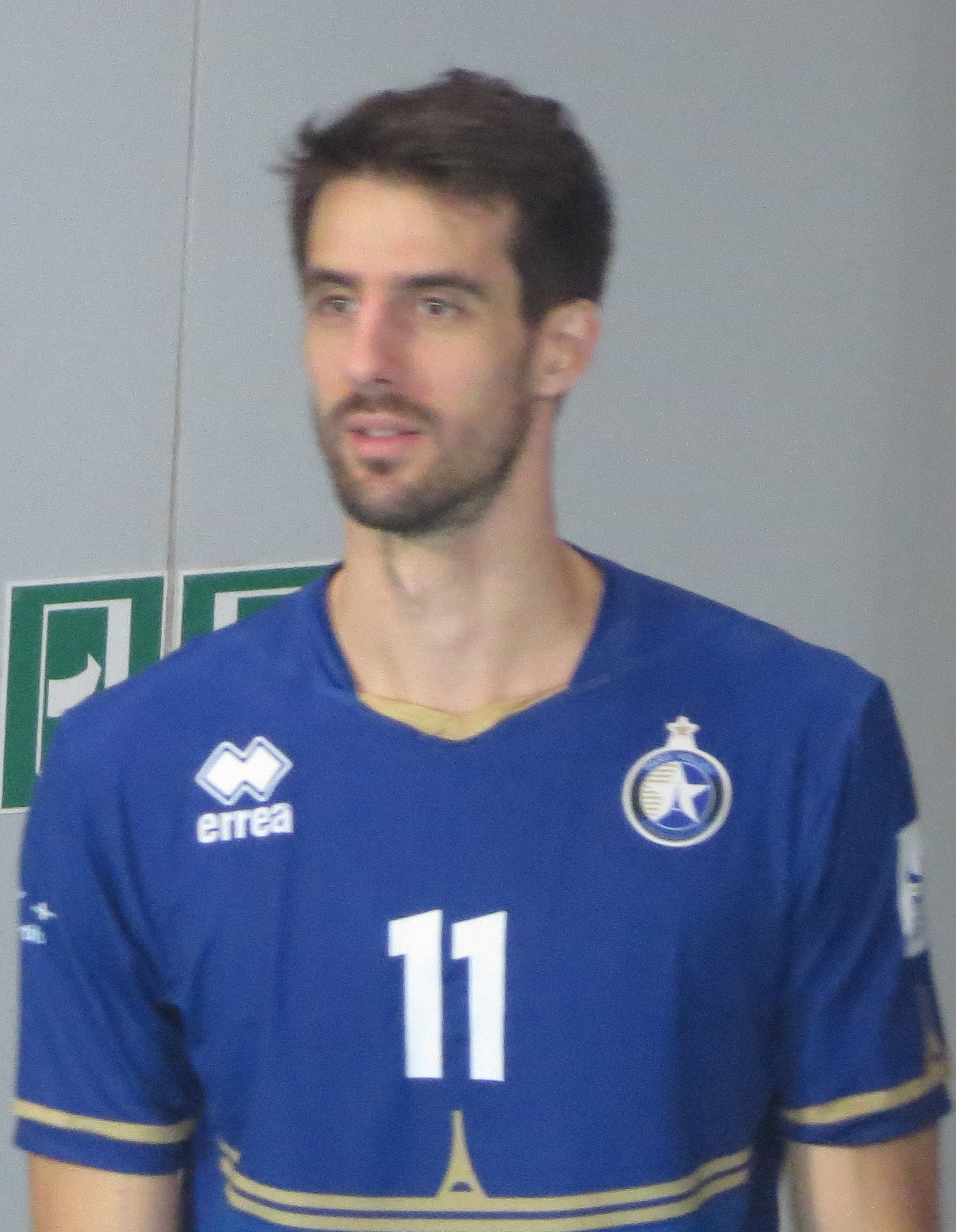 Match 2 de la finale du Championnat de Pro B entre le Paris Volley et le Saint-Nazaire Volley-Ball Atlantique 11 LAFITTE FRANCK